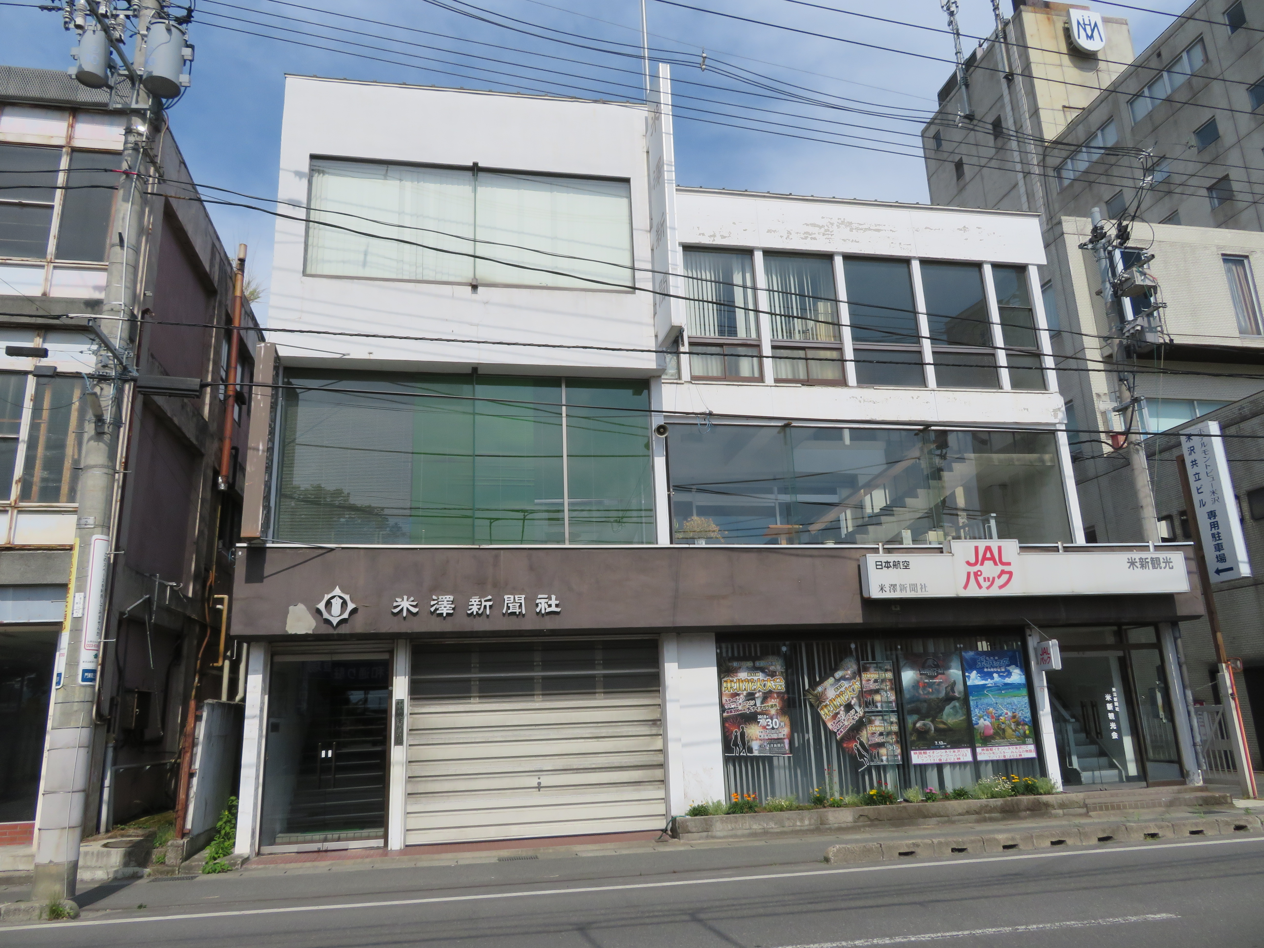 米澤新聞社社屋 Canon PowerShot SX720 HS